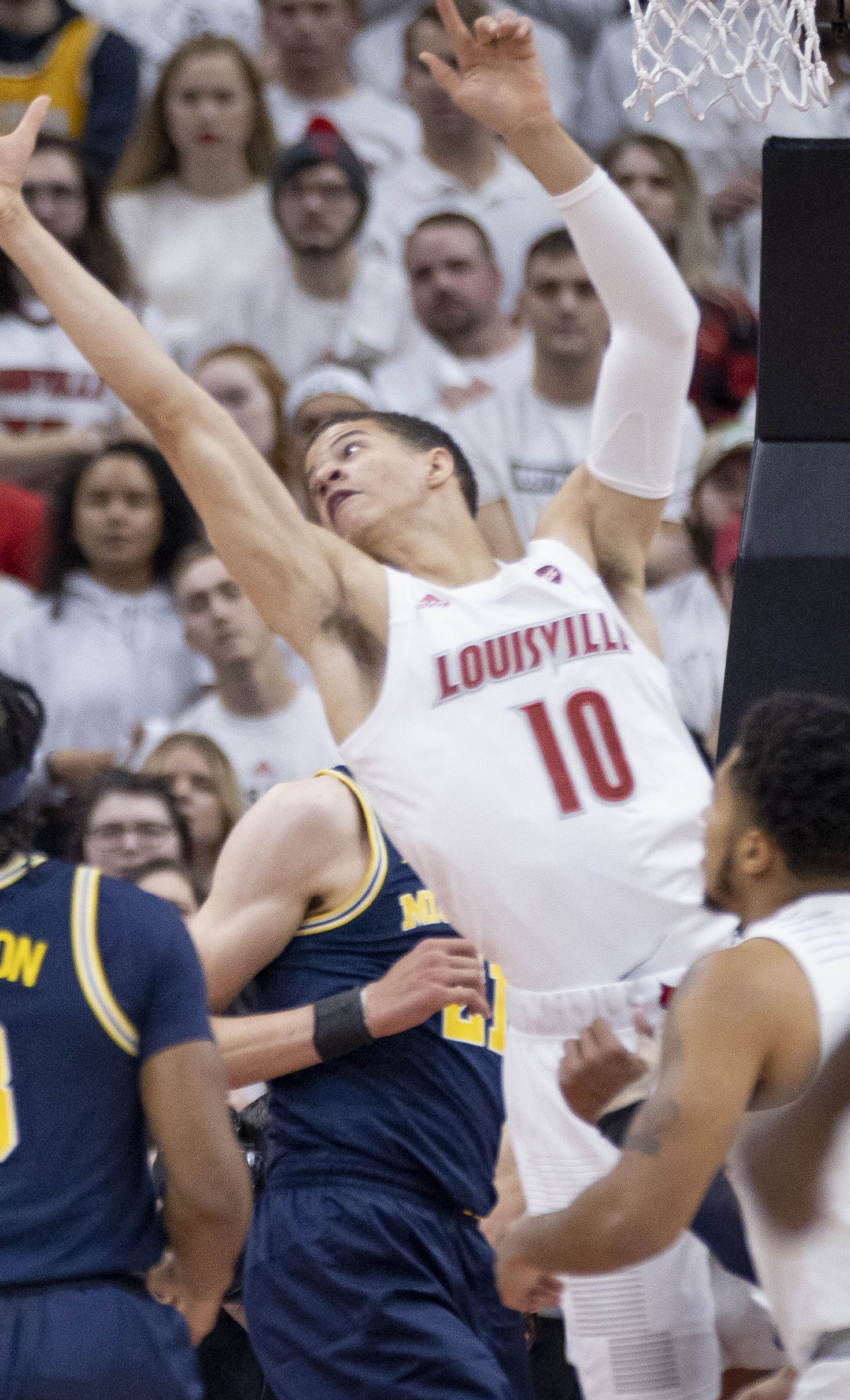 8V6A9671